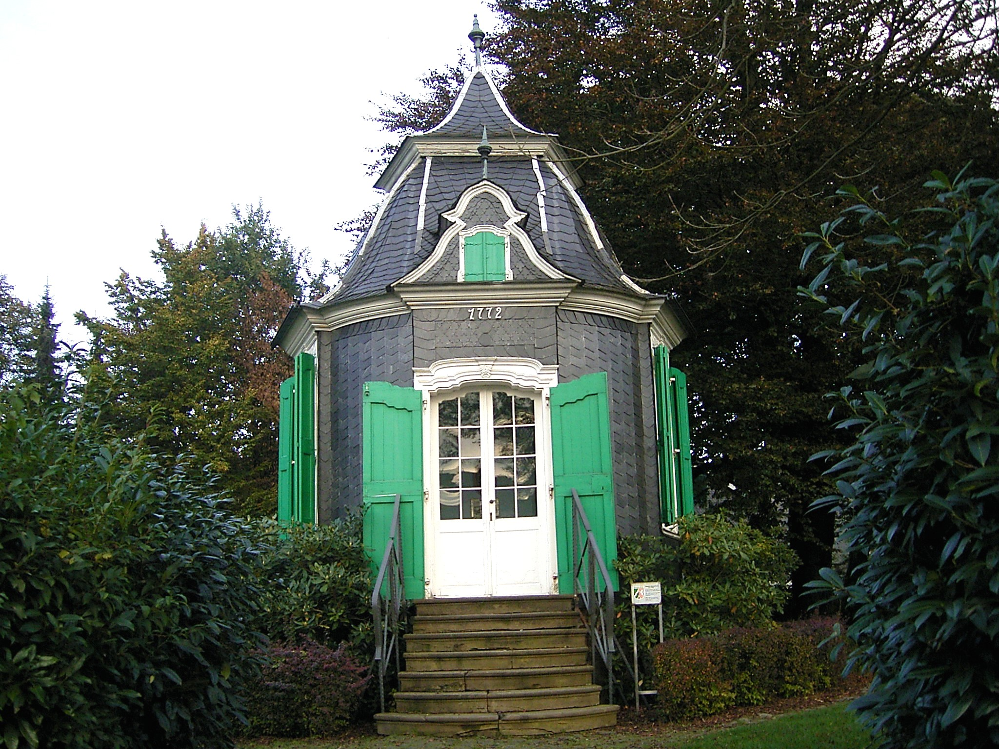 Radevormwald